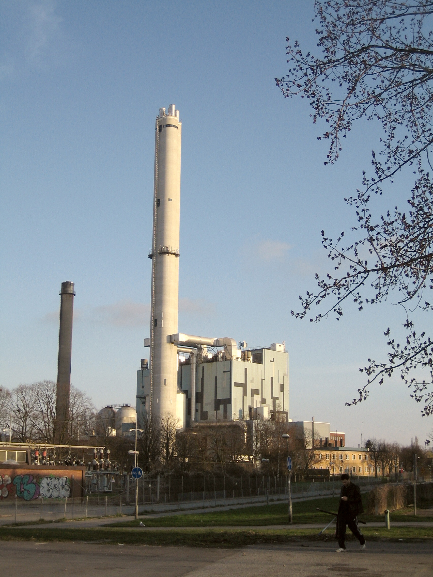 Heleneholmsverket power plan in Malmö, Sweden.